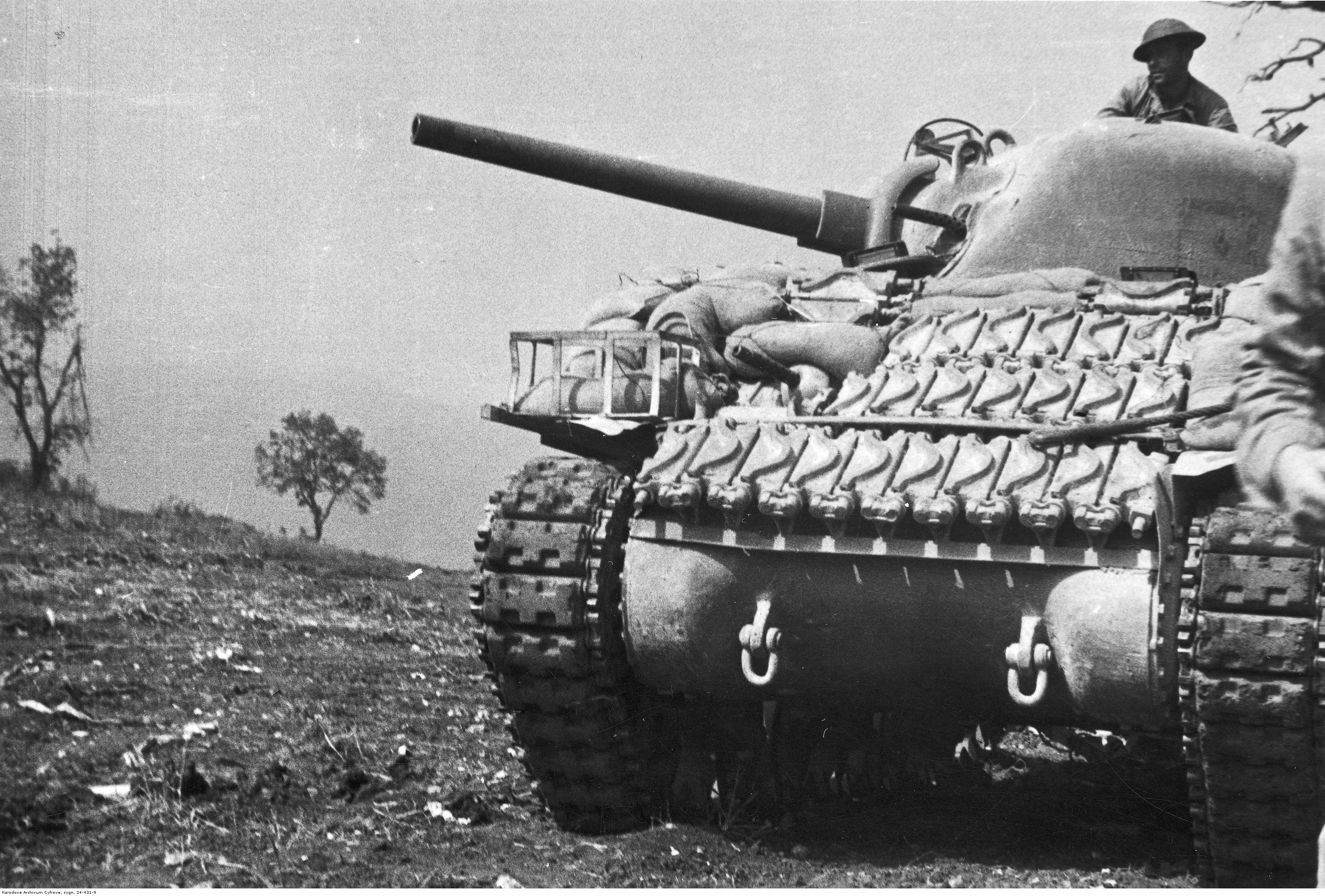 Samodzielna 2 Brygada Pancerna 2 Korpusu Polskiego w bitwie o Monte Cassino. Czołg M4 Sherman ppor. Szabłowskiego z 4 Pułku Pancernego "Skorpion" na wzgórzu "Żbik". Archiwum Fotograficzne Tadeusza Szumańskiego. Sygnatura: 24-431-9